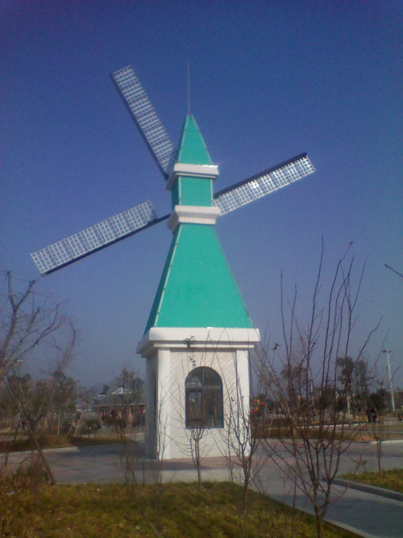 福宁文化公园中的荷兰风车